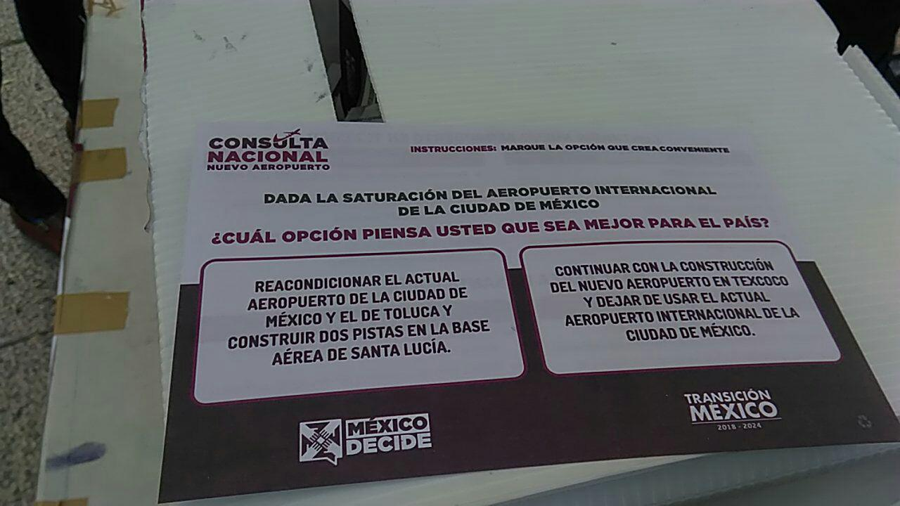 Consulta ciudadana, seguir en NAICM o en Santa Lucia